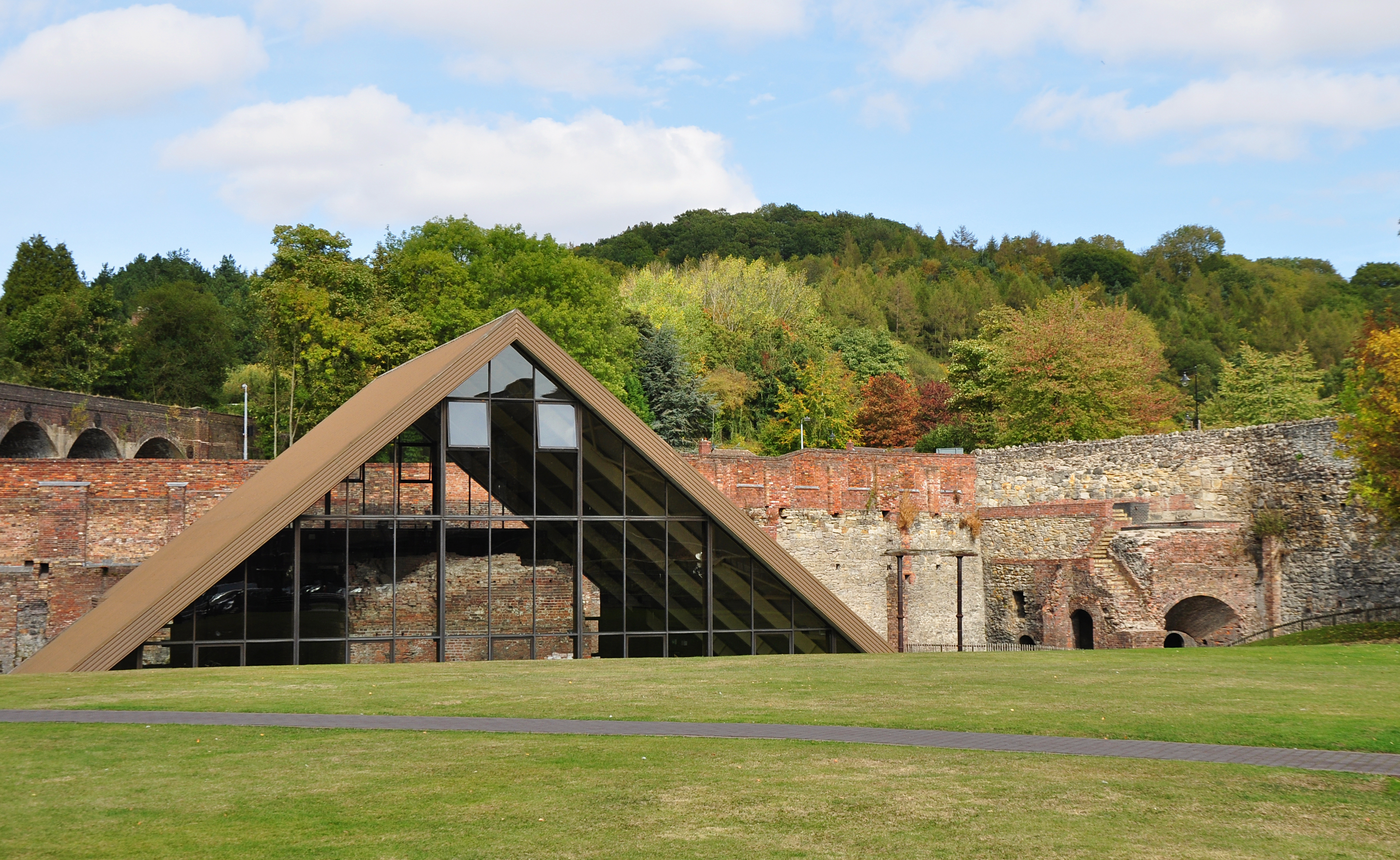 Доменна піч компанії Coalbrookdale Co, на якій Абрахам Дербі вперше в історії доменного виробництва використав кокс для доменної плавки. Піч розташована у павільоні. Місто Колбрукдейл, Музай заліза Айронбріжд, Англія.